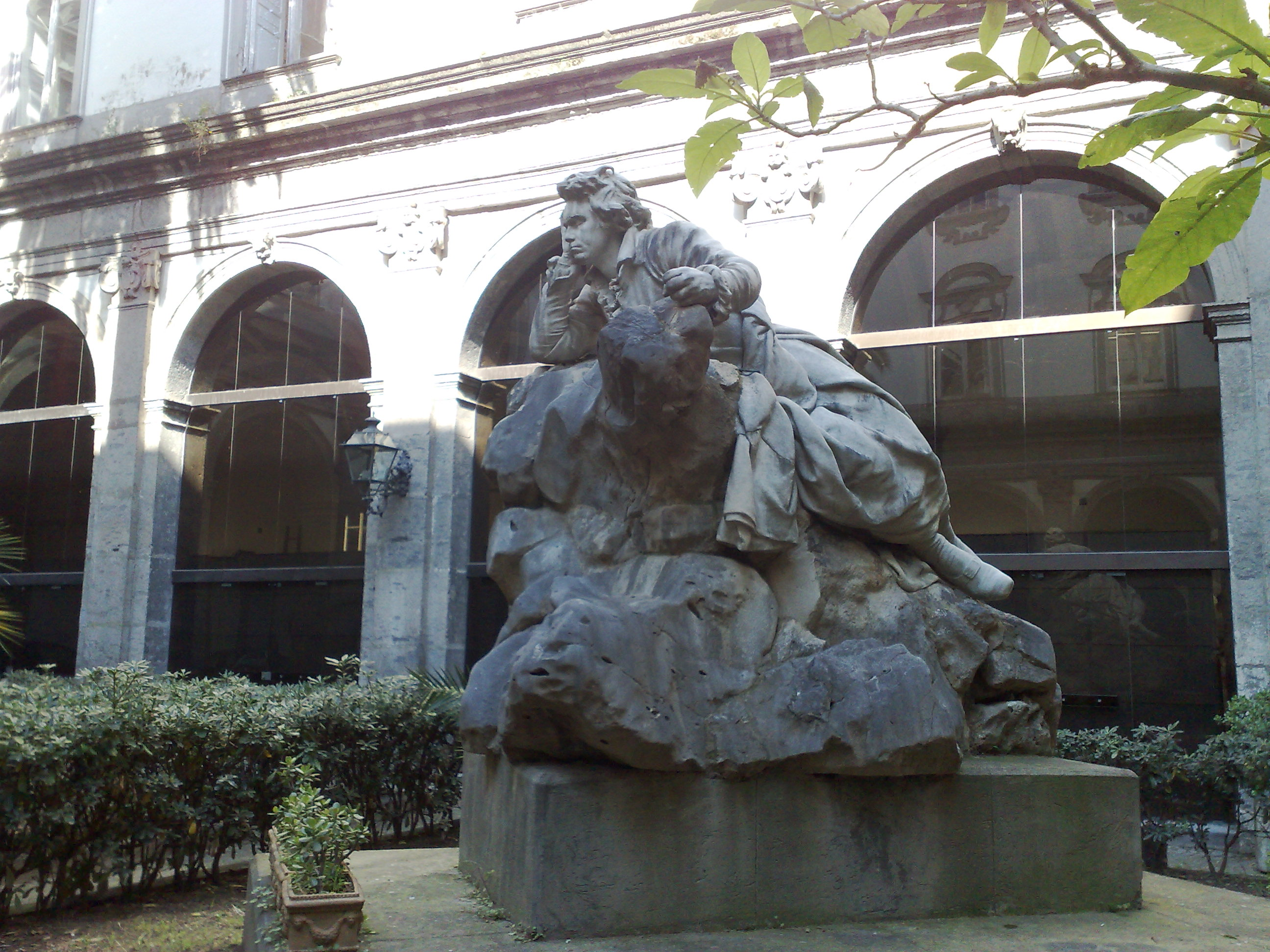 Beethoven, presso il Conservatorio di San Pietro a Majella (Napoli). Scultura di Francesco Jerace del 1985.